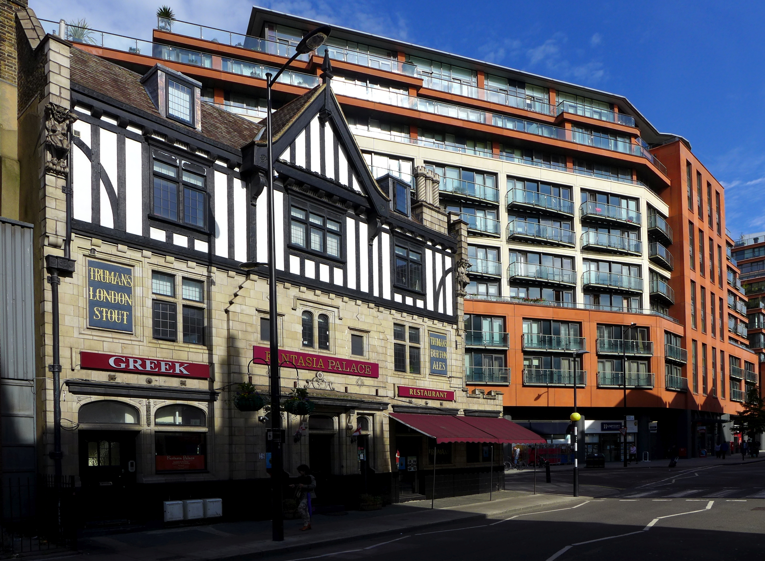 Ehemaliges Public House "Grand Junction Arms" in der Praed Street, Paddington, London. Historisches Gebäude von etwa 1814 mit vielen gestalterischen Elementen der etwa in 1666 gegründeten und in 1988 liquidierten Brauerei Truman, Hanbury, Buxton & Company Limited. Nach 1988 Gebäudenutzung durch eine Personalvermittlungsfirma und anschließend durch Restaurantbetreiber unter den Namen Babylon und Fantasia Palace. Aufnahmedatum 2014-09.